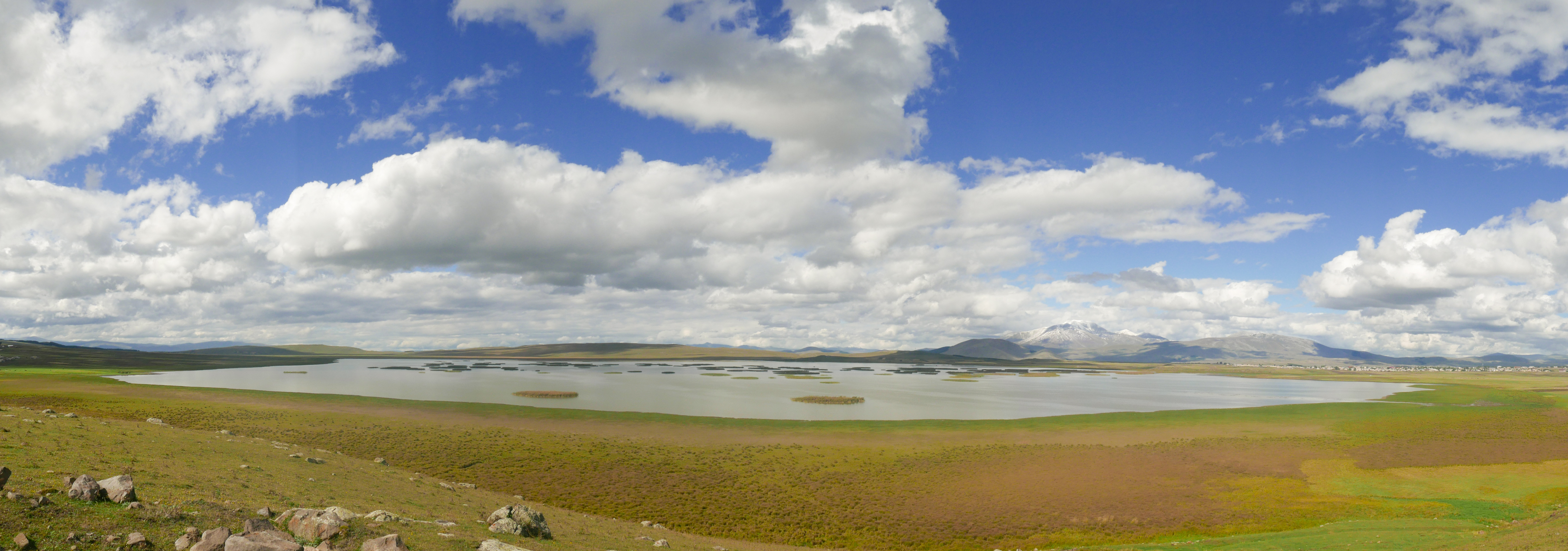 ხანჩალი საქართველოს ტერიტორიაზე ზომით მეოთხე ტბაა. მისი ფართობი 1310 ჰექტარს შეადგენს. მდებარეობს ჯავახეთის ზეგანზე ზღვის დონიდან 1928 მეტრზე.